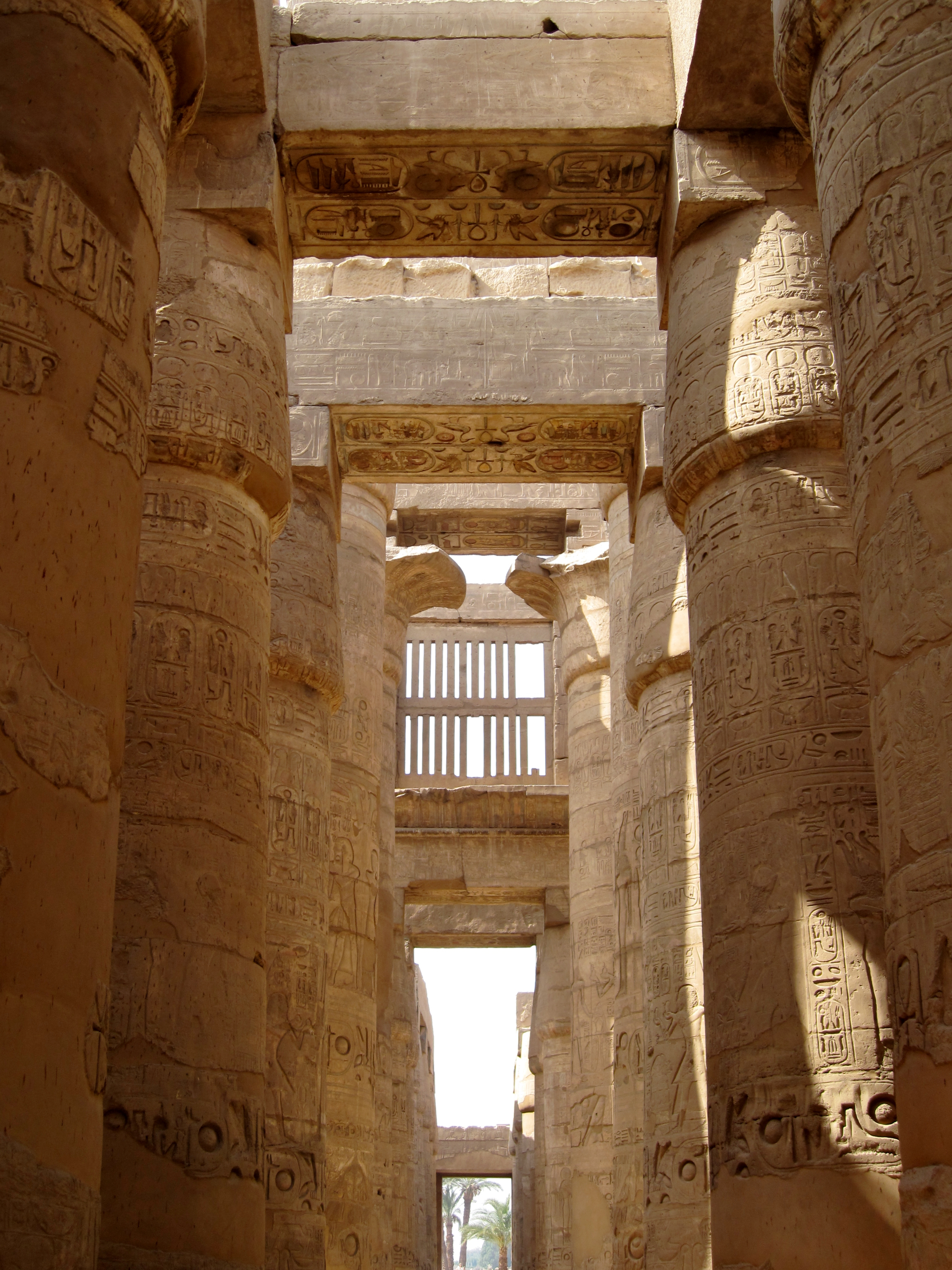 Große Säulenhalle im Tempel von Karnak nördlich Luxor, Ägypten